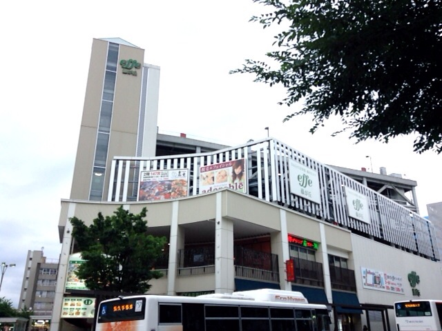 名古屋市名東区にある藤が丘effe